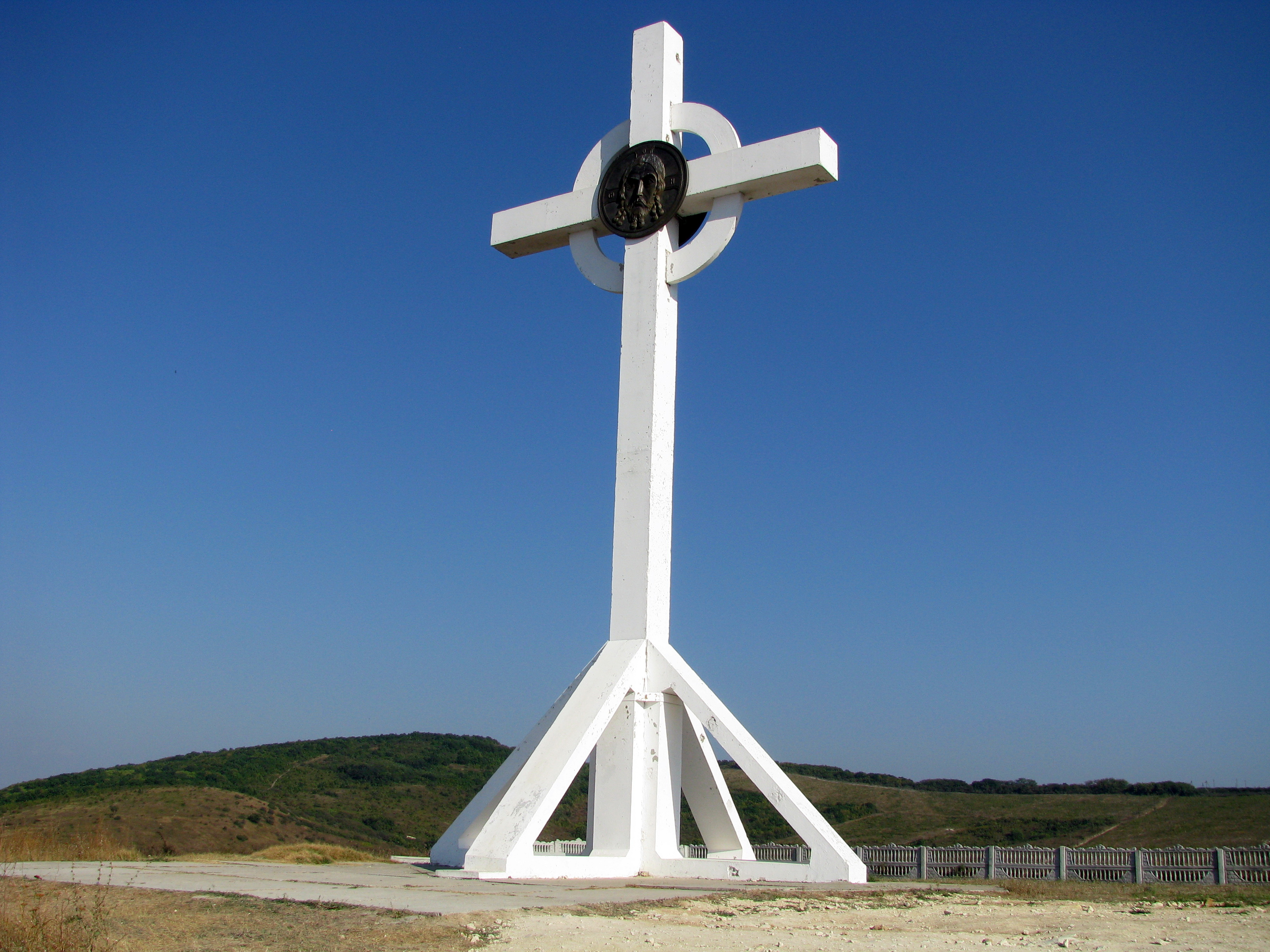 Поклонный крест, Су-псех, городской округ Анапа